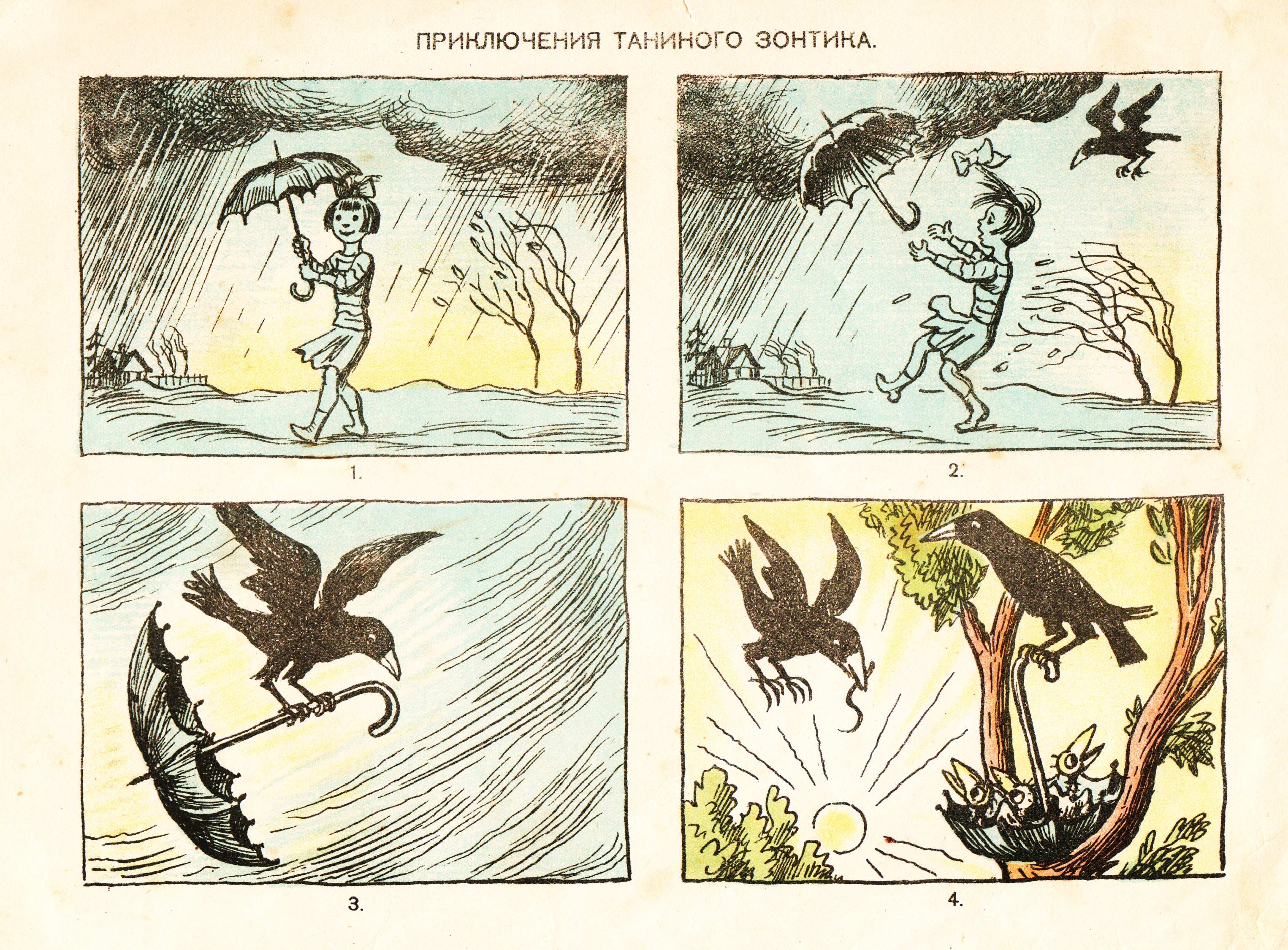 Рассказы в картинках. 1-е издание, Детиздат ЦК ВЛКСМ, Ленинград